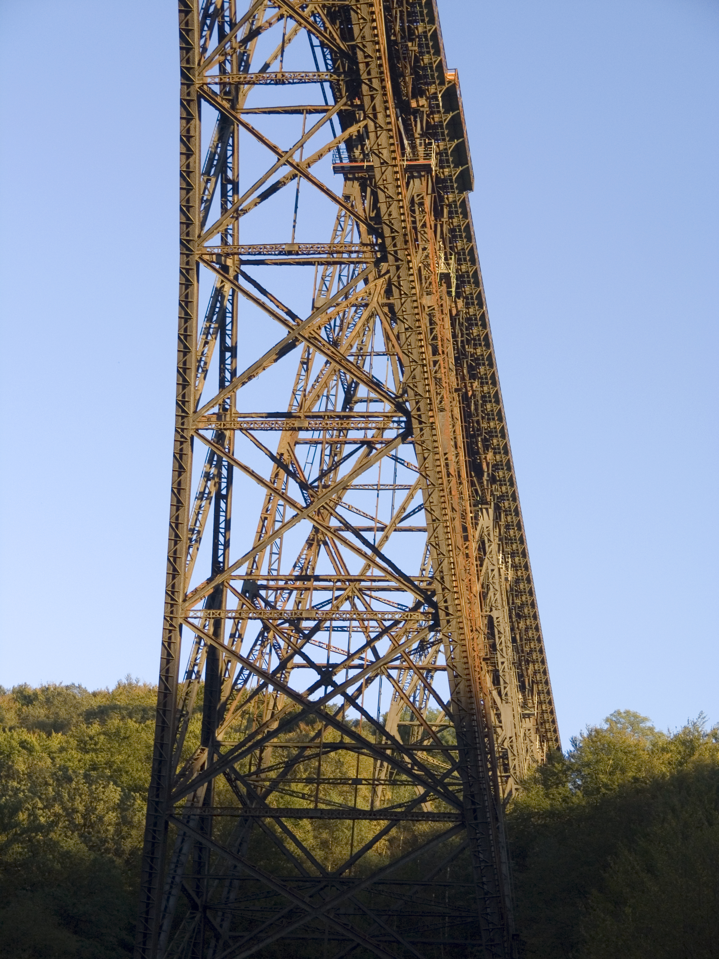 Северный Рейн - Вестфалия, Золинген - Мост Mungstener